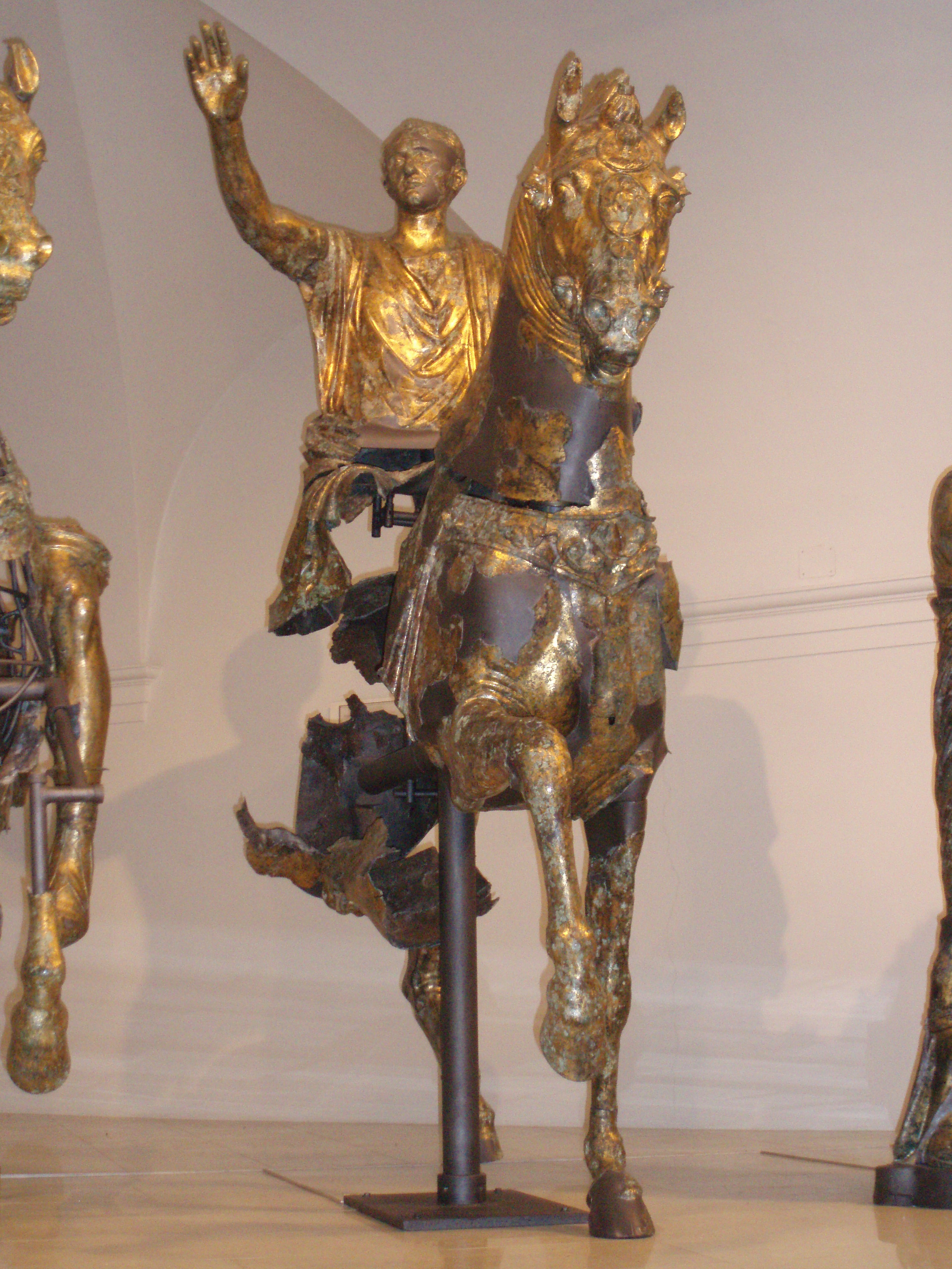 Bronzi dorati da Cartoceto di Pergola - 14